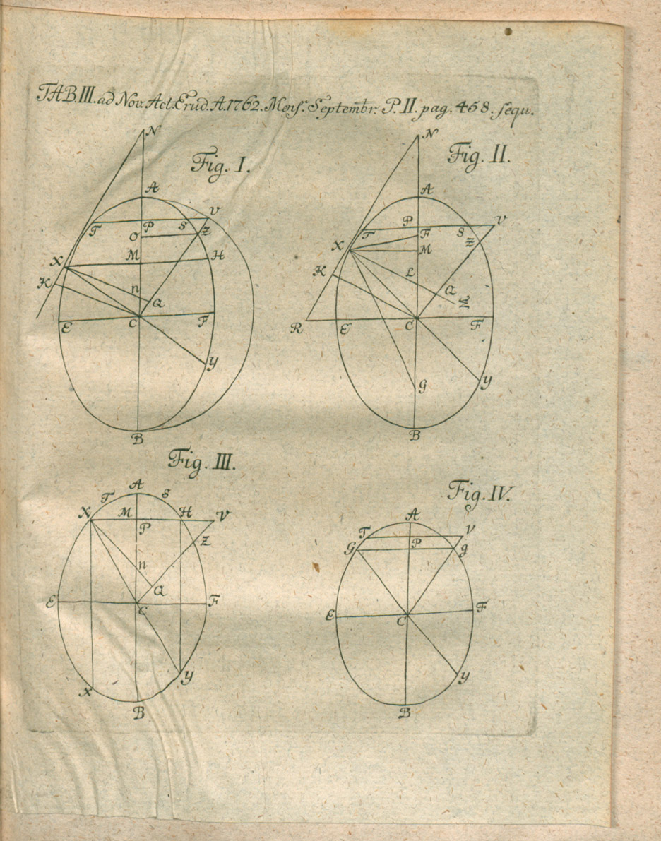 Illustration